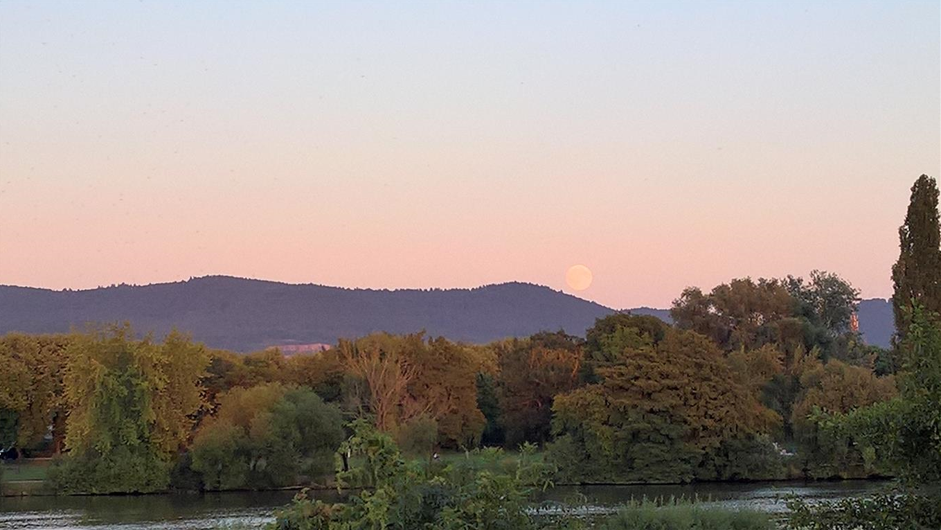 Mondaufgang